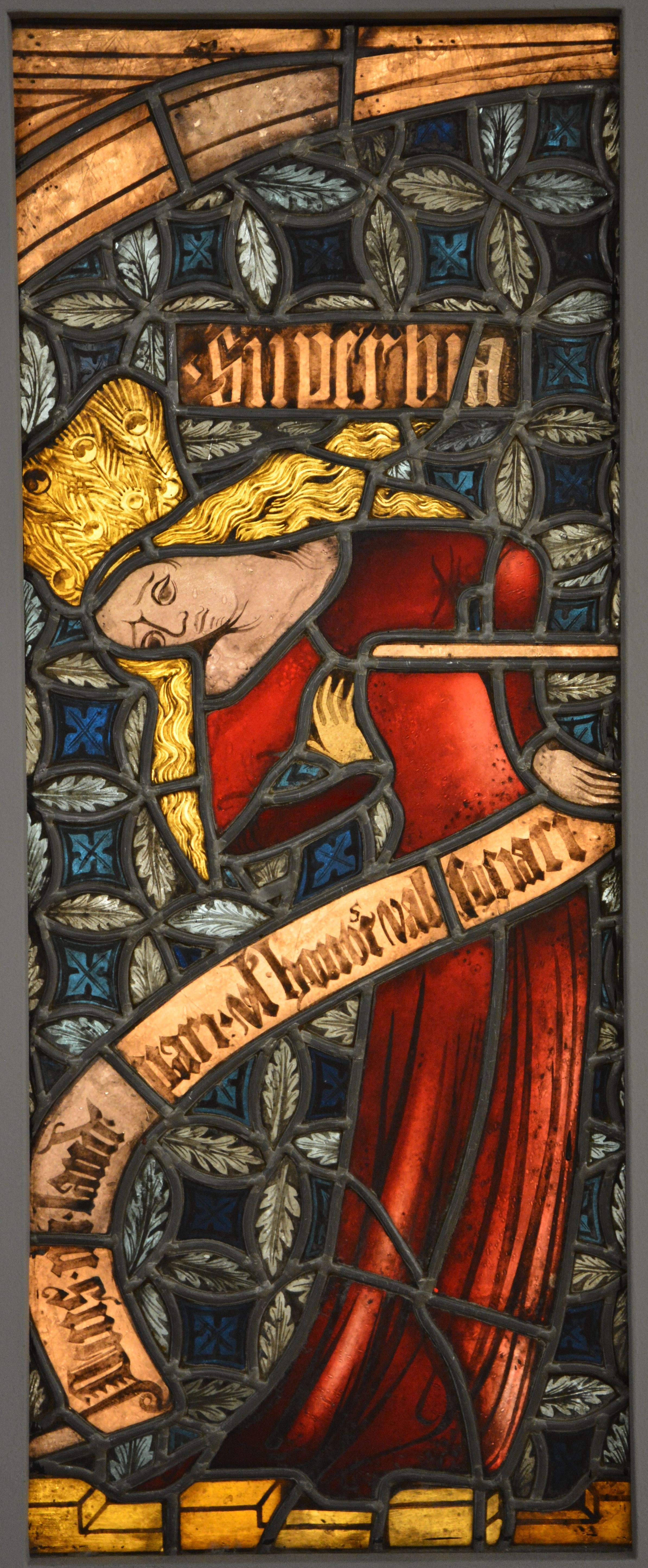 Odilo Kurka: Kopie 'Superbia', Antikglasfenster 14 Jh., Stadtpfarrkirche Wels, OÖ